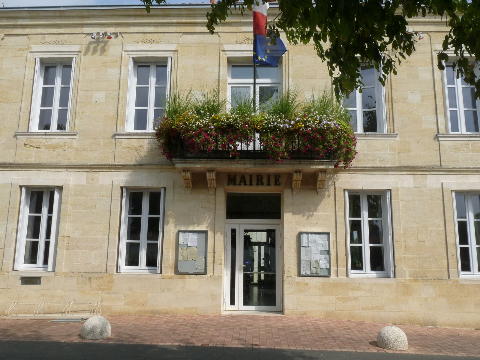 Mairie de Braud-et-Saint-Louis,Gironde, France